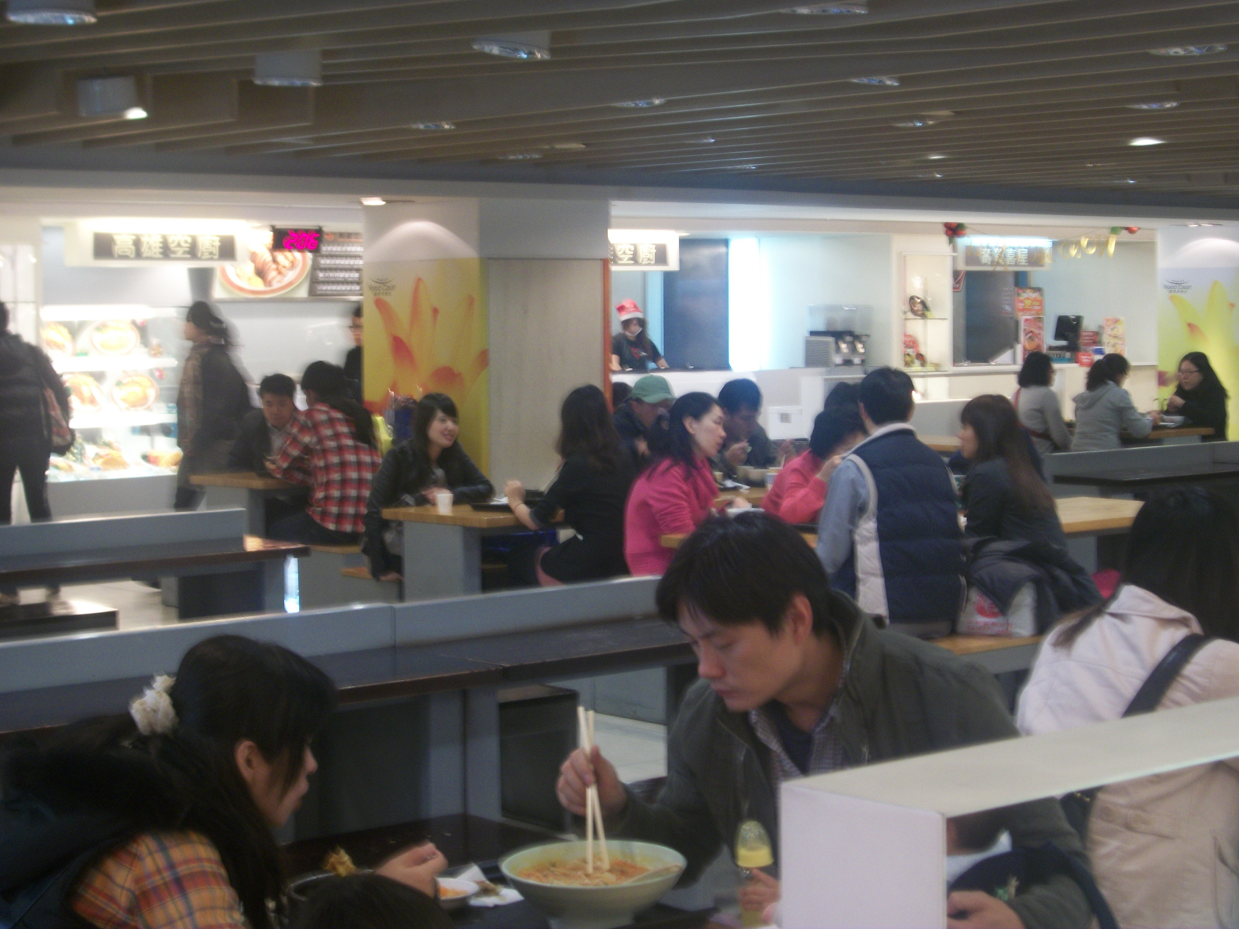 臺中市中友百貨美食街